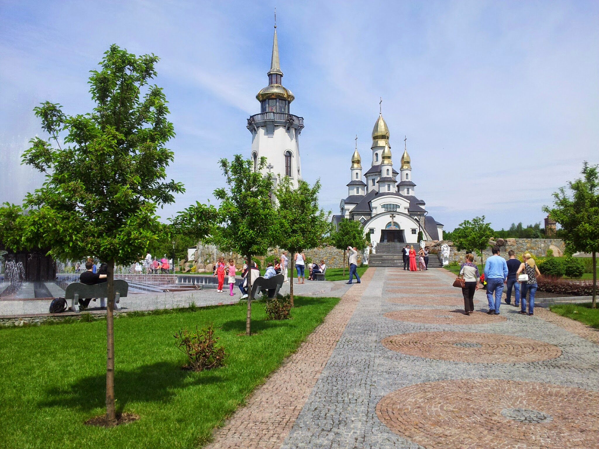 Buky, Kyivs'ka oblast, Ukraine, 09022